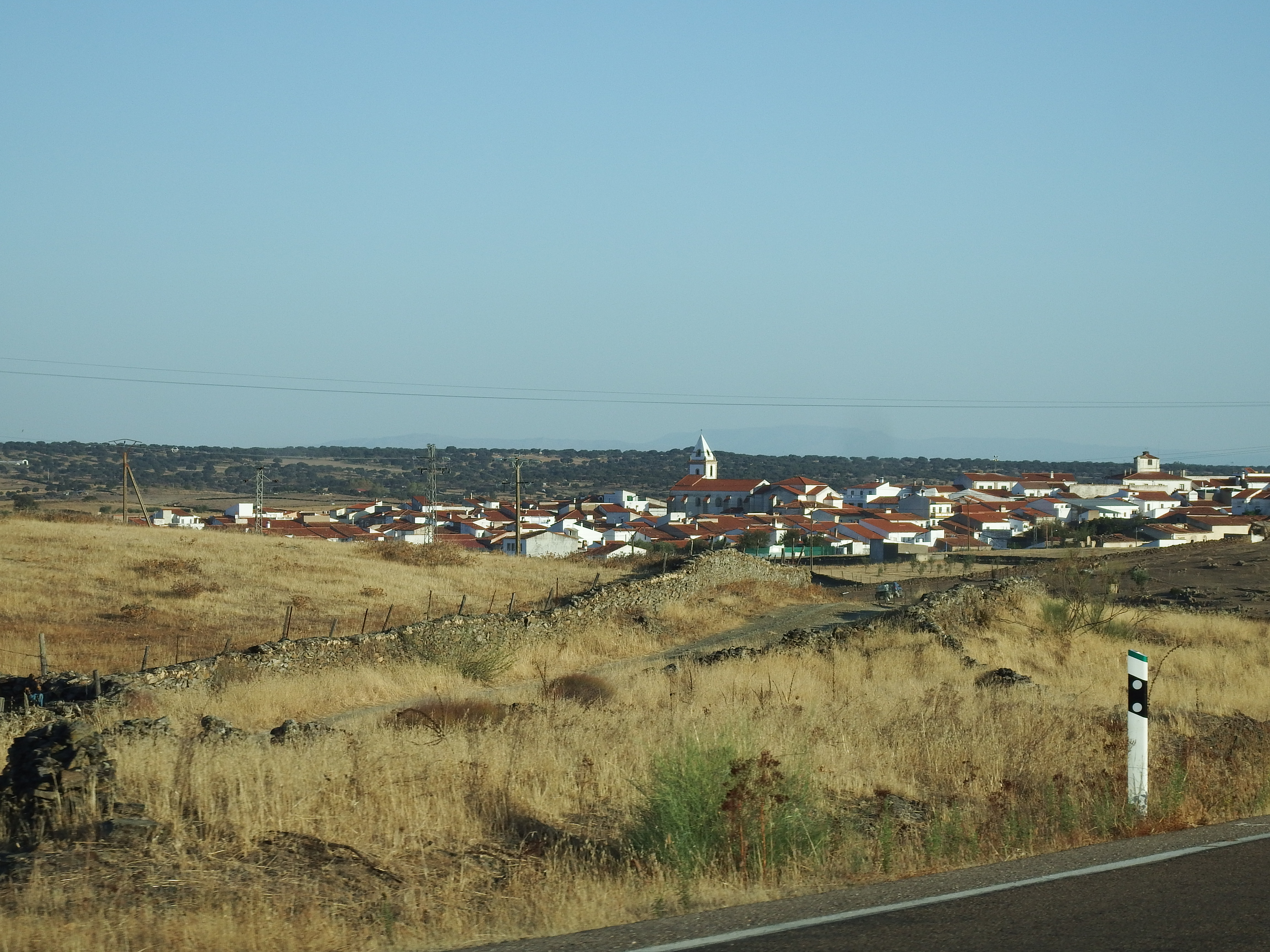 Membrío